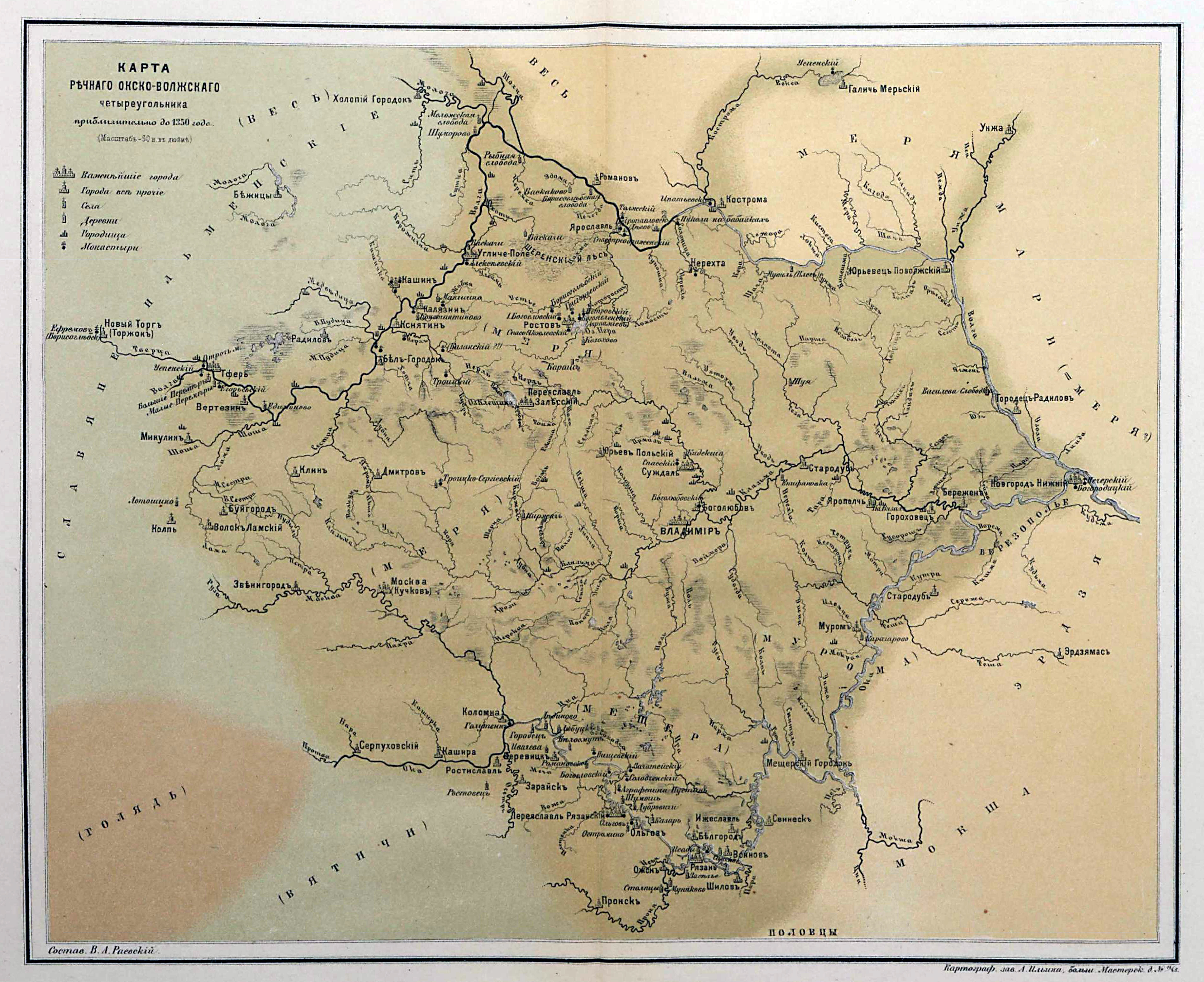 Карта речного Окско-Волжского четырехугольника (приблизительно до 1350 года).